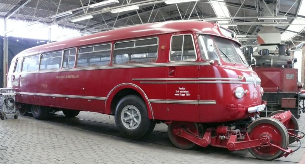 Schienenkombibus